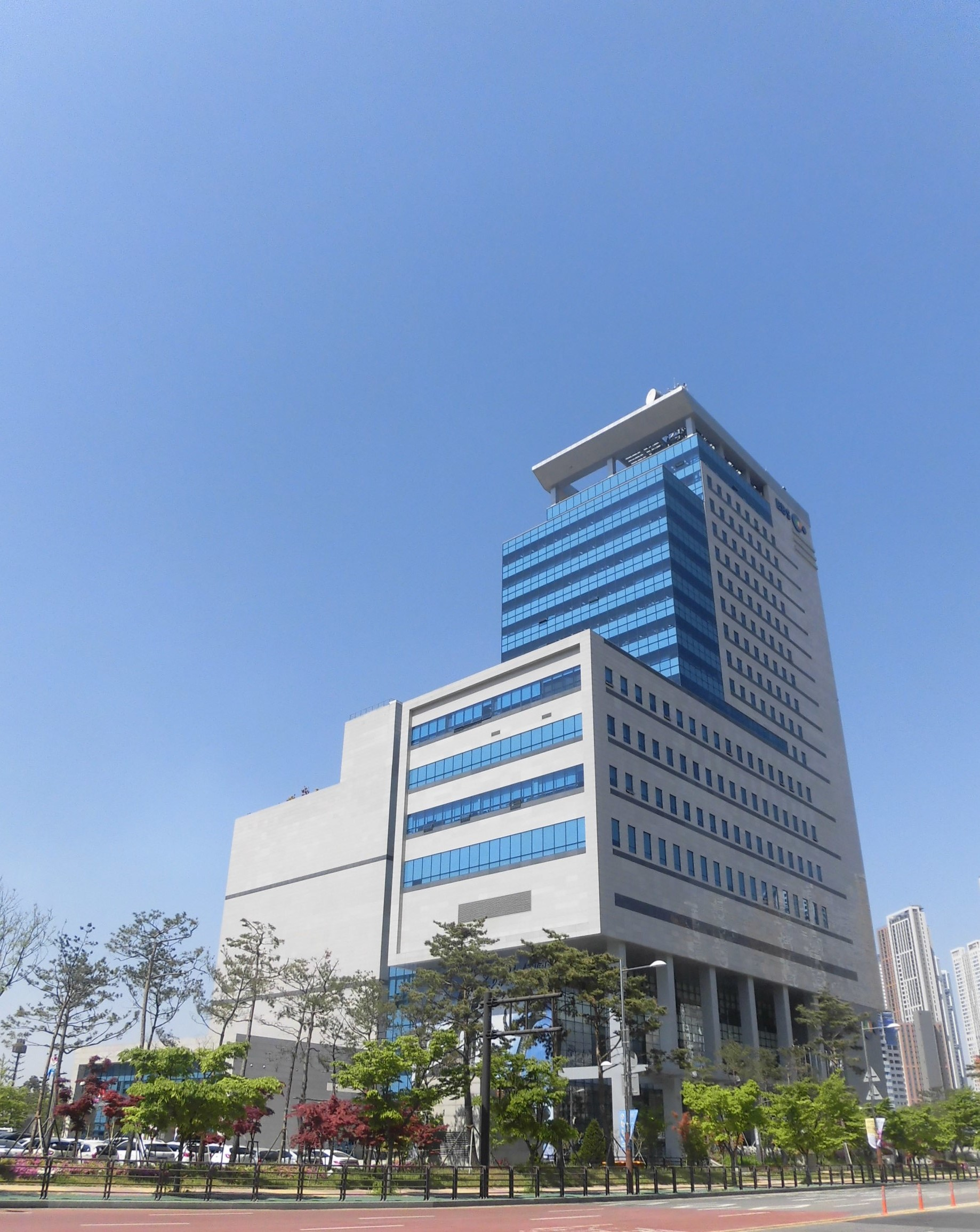 경기도 고양시에 있는 한국교육방송공사